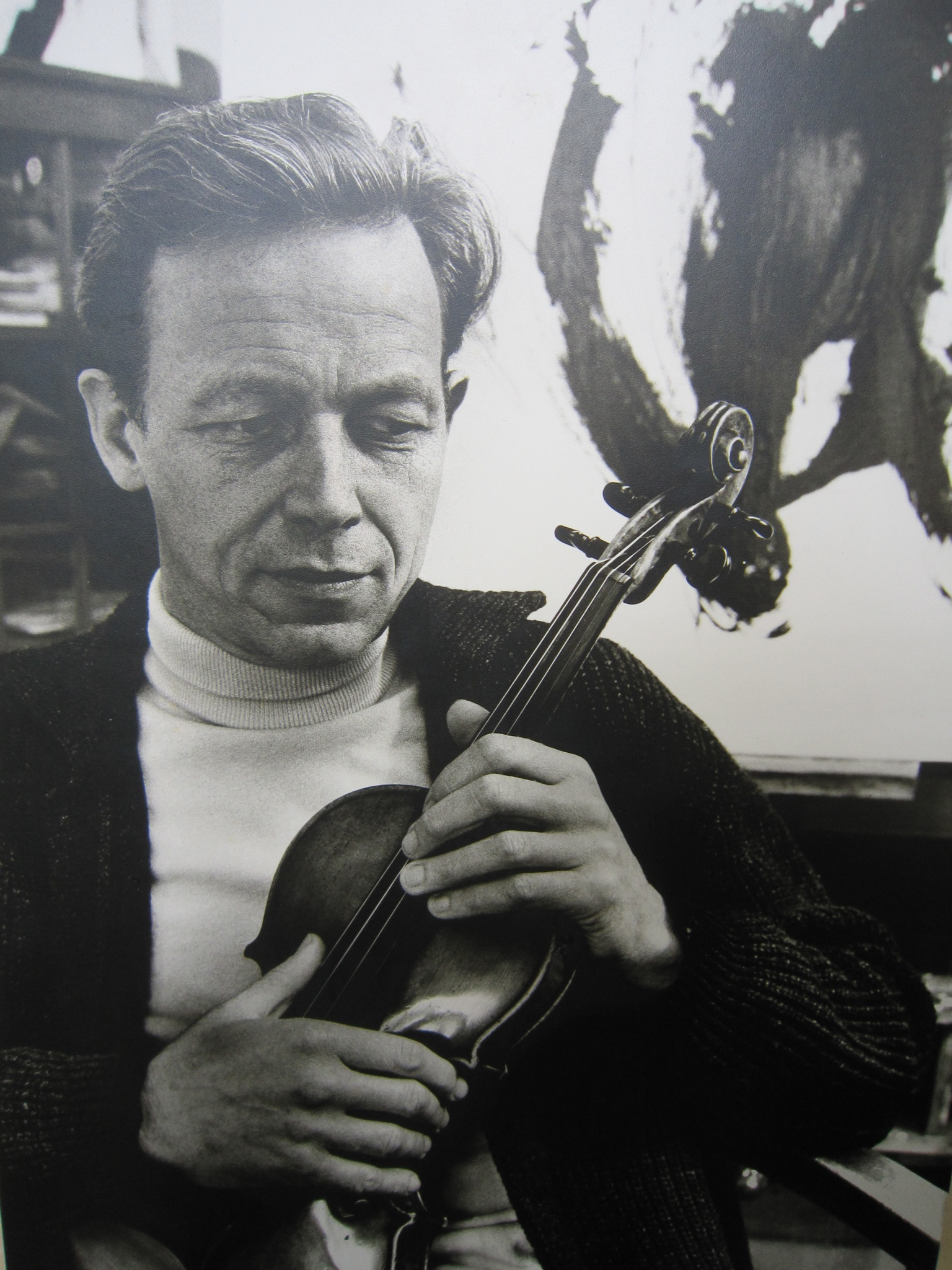 Georg W. Brosche